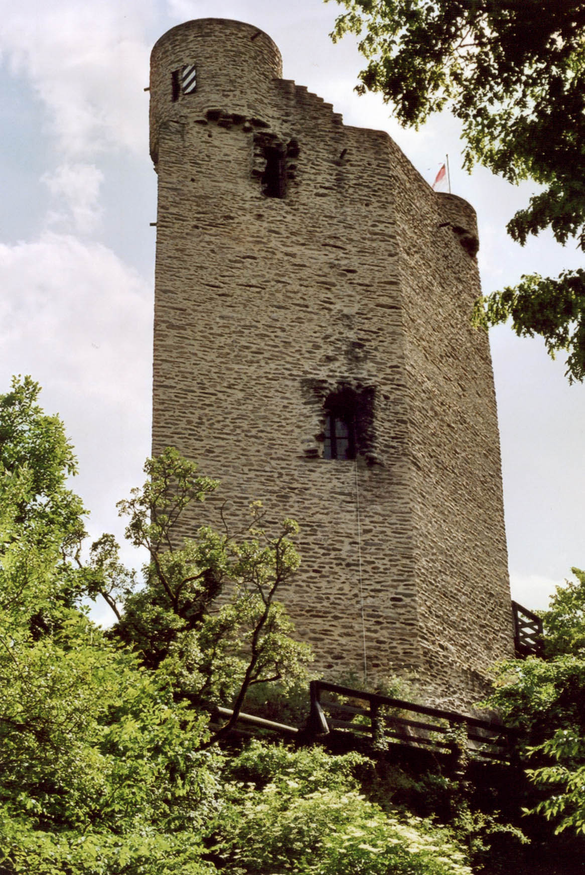 Wohnturm